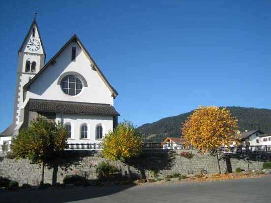 Herz-Jeus Kirche in Falera